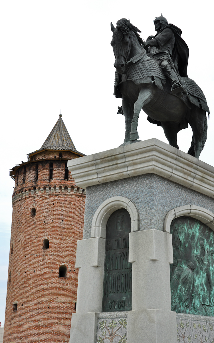 Башня Коломенская (Маринкина) (Москва и Московская область, Коломна, улица Лазарева, угол улица Октябрьской Революции)